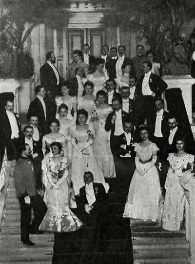 Bal u Andrzeja i Krystyny z Tyszkiewiczów Potockich